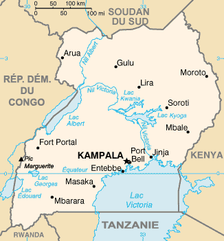 Carte de l'Ouganda.